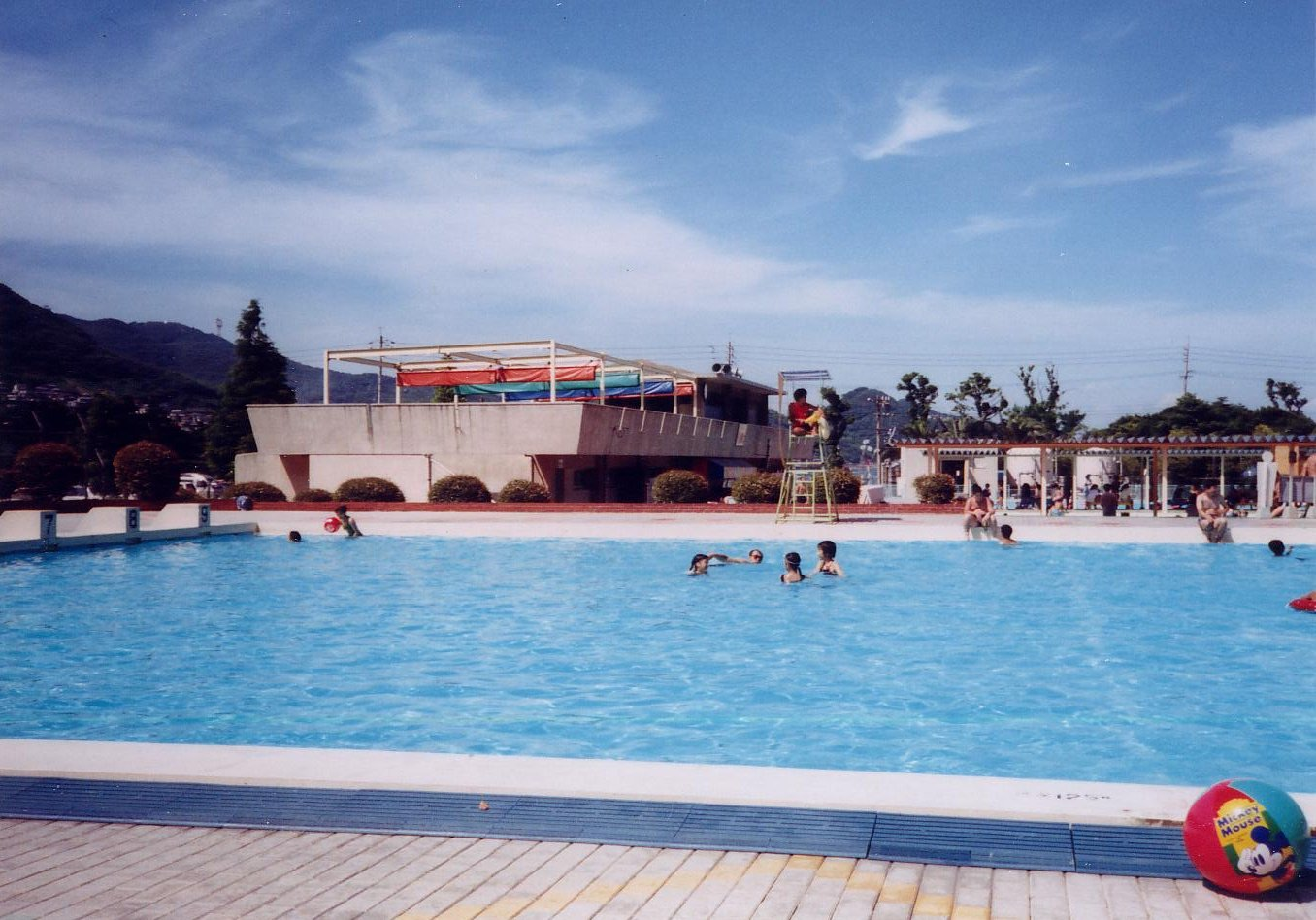 pool side